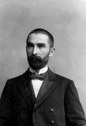 Депутат Второй Государственной думы от Терской губернии Т.Э. Эльдарханов.